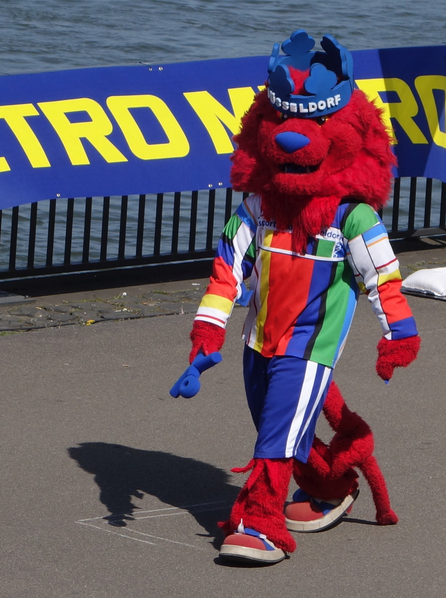 METRO-Marathon in Düsseldorf, 30. April 2017 . Der Löwe Tosi, das Düsseldorf-Maskottchen.